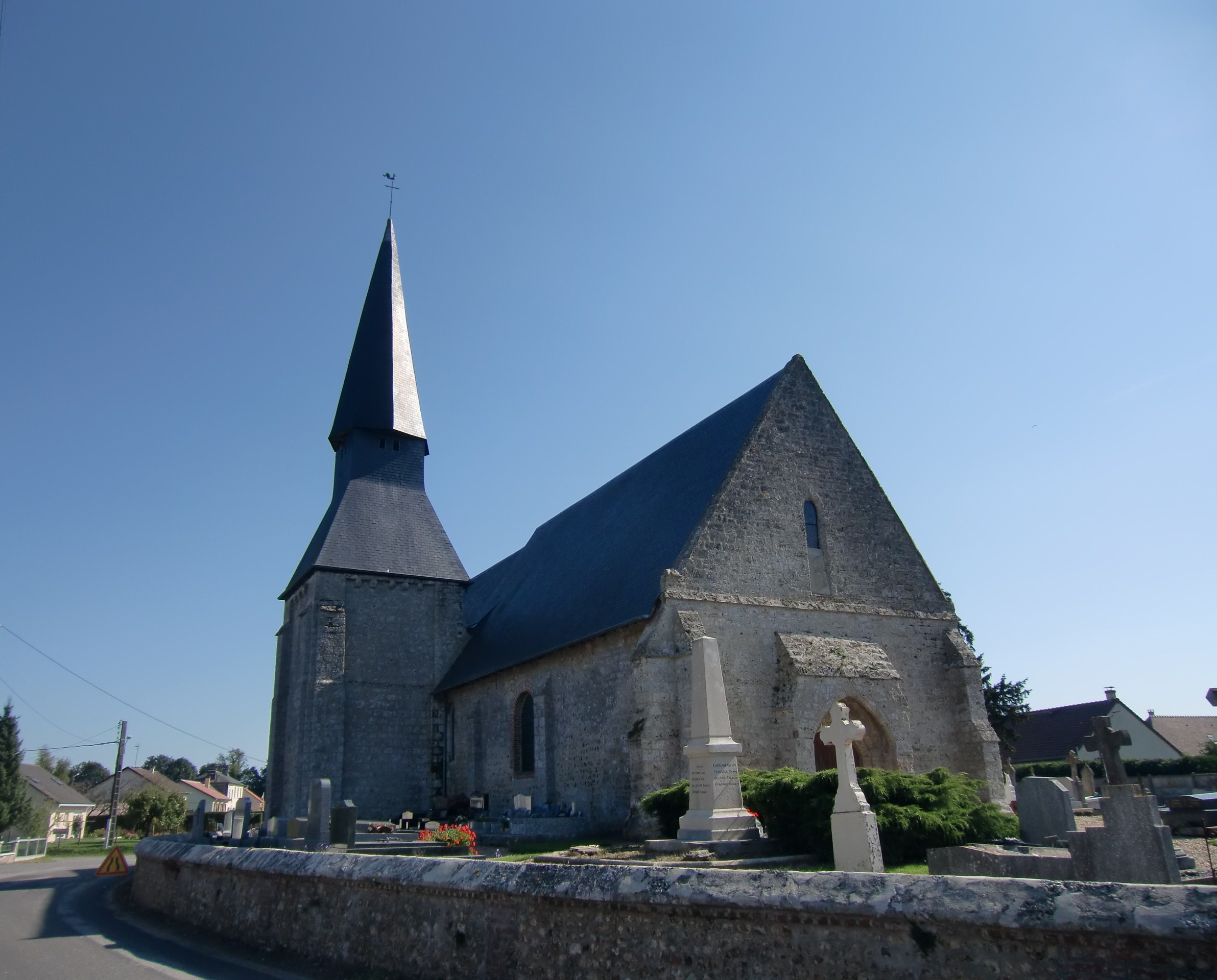 église du Torpt (Eure, Normandie, France)